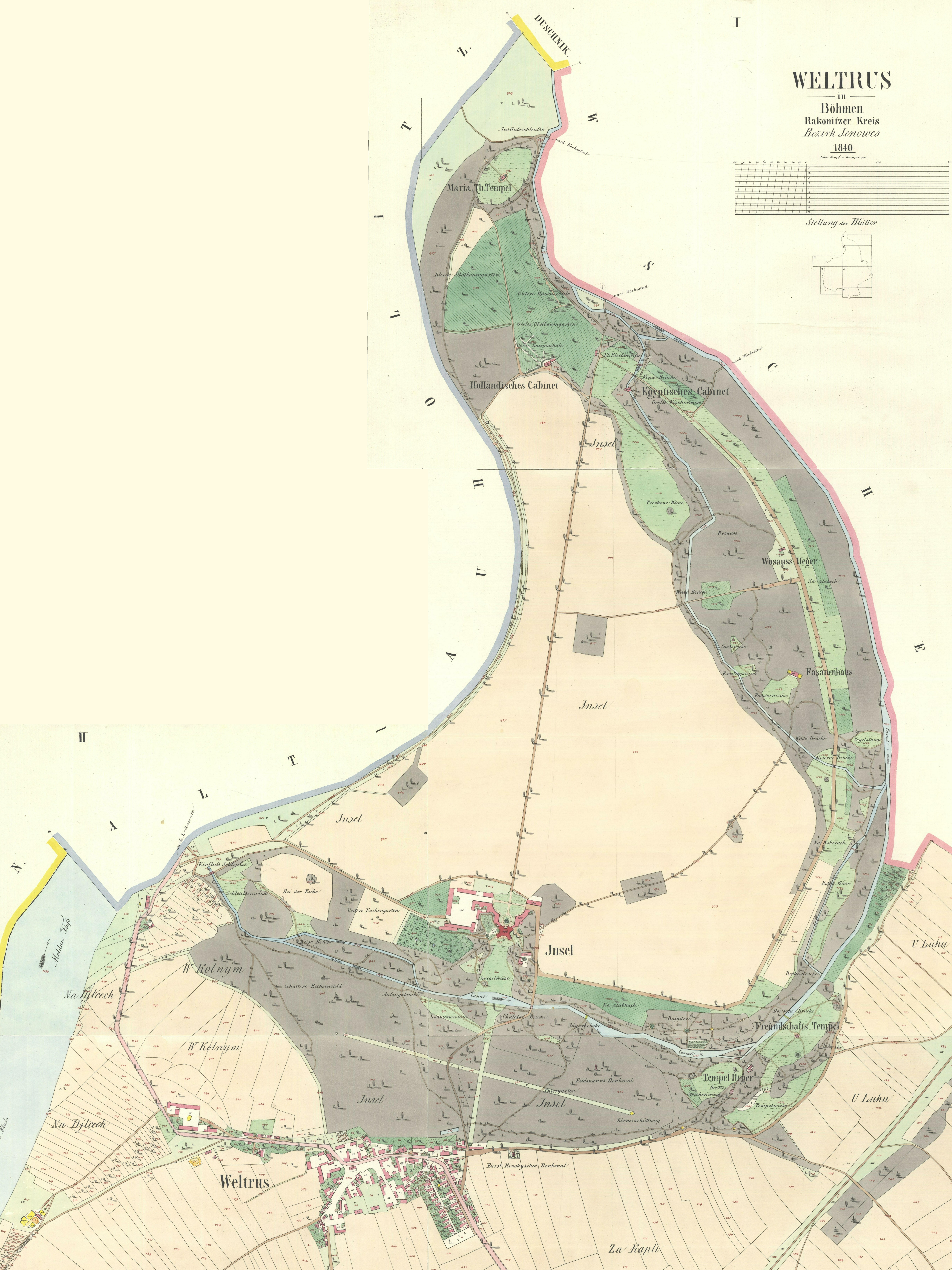 Veltrusy, zámek Veltrusy a zámecký park na císařských otiscích map stabilního katastru.